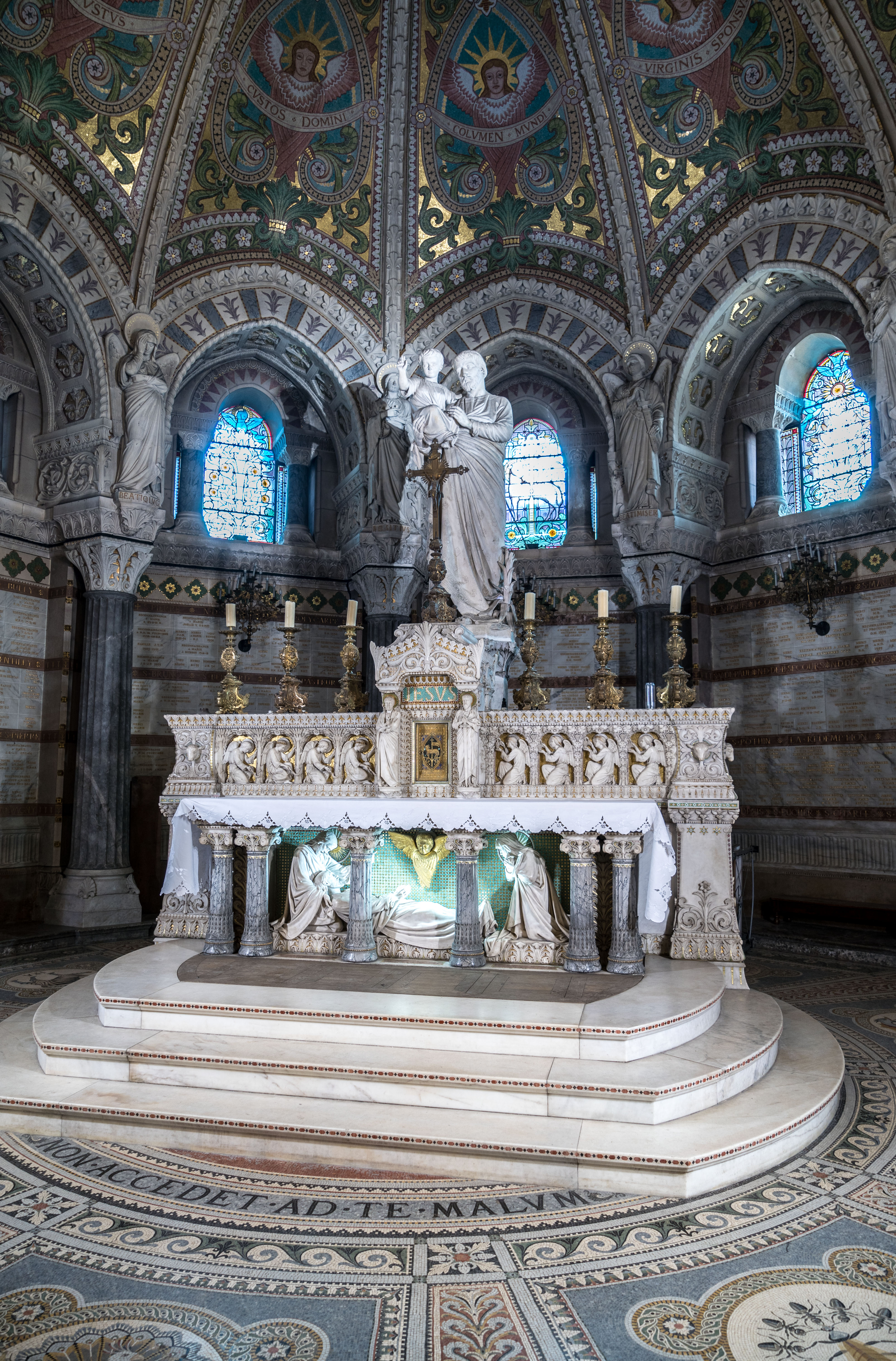 Lyon - Basilique de Fourvière - Eglise Basse - Autel